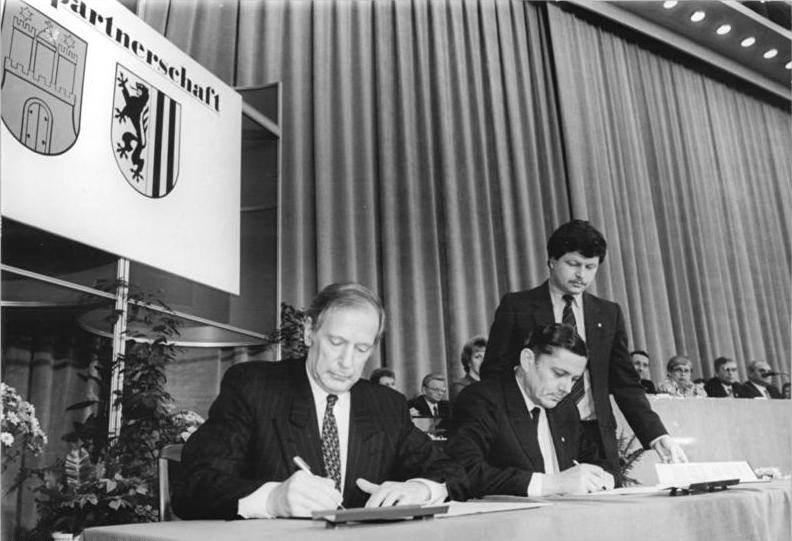 ADN-ZB-Häßler-21.1.88-Dresden: Städtepartnerschaft- 14.12.87 unterzeichneten der Dresdner Oberbürgermeister, Wolfgang Berghofer (r.), und der Präsident des Amtsrates und 1. Bürgermeister der Hansestadt Hamburg, Klaus von Dohnanyi (l.), die Vereinbarung zur Entwicklung kommunaler Beziehungen im Plenarsaal des Rathauses.